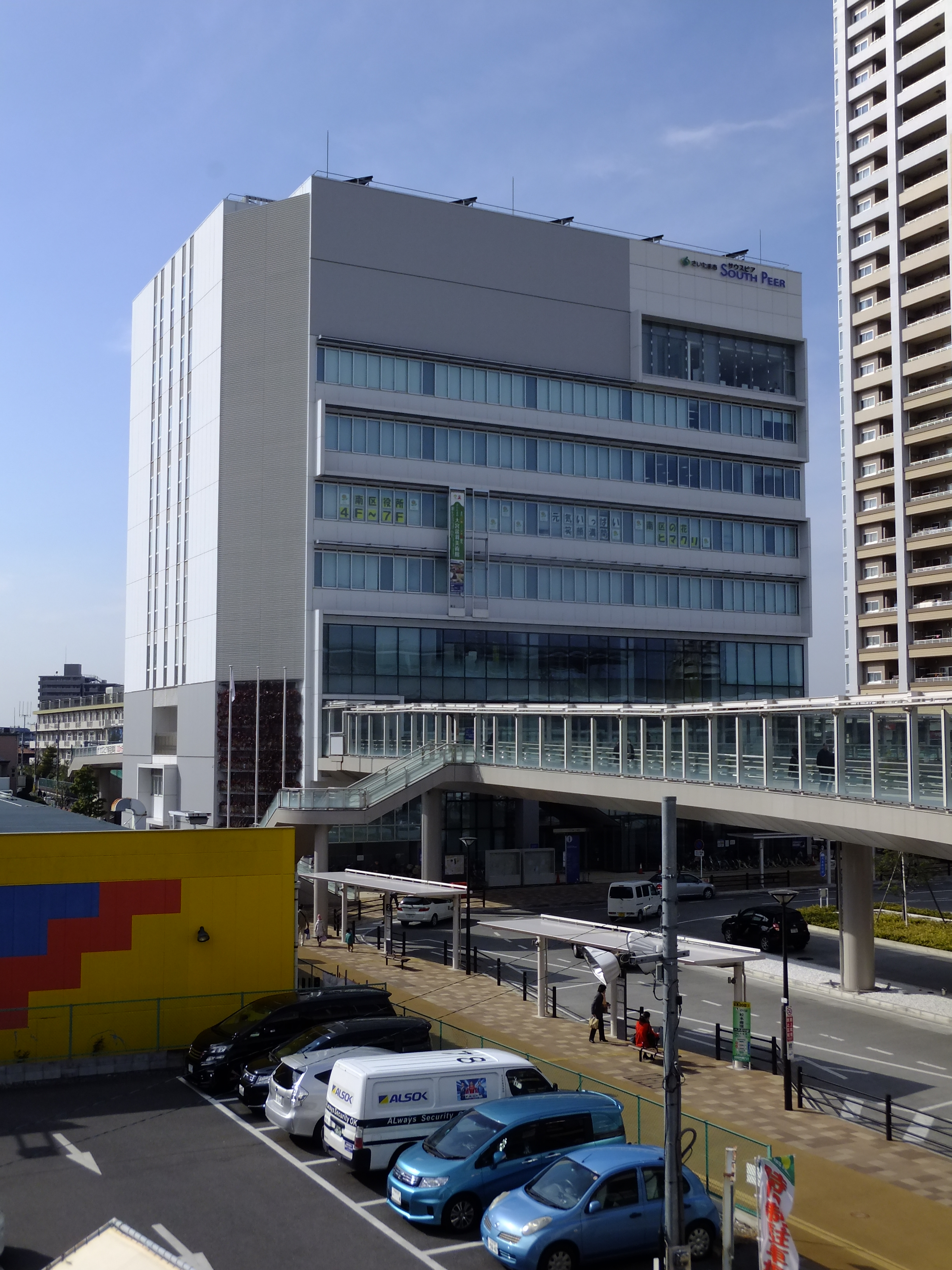 さいたま市南区役所「サウスピア」。区役所ほかさいたま市立武蔵浦和図書館、子育て支援センターほかが入る複合公共施設である。